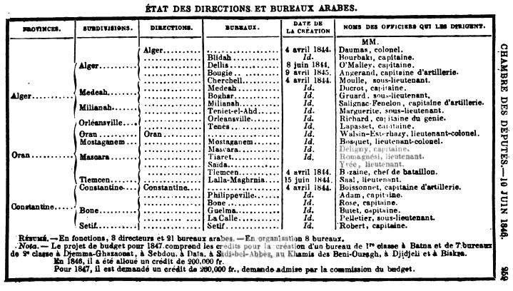 Etat des directions et bureaux arabes. Chambre des députés. 10 juin 1846